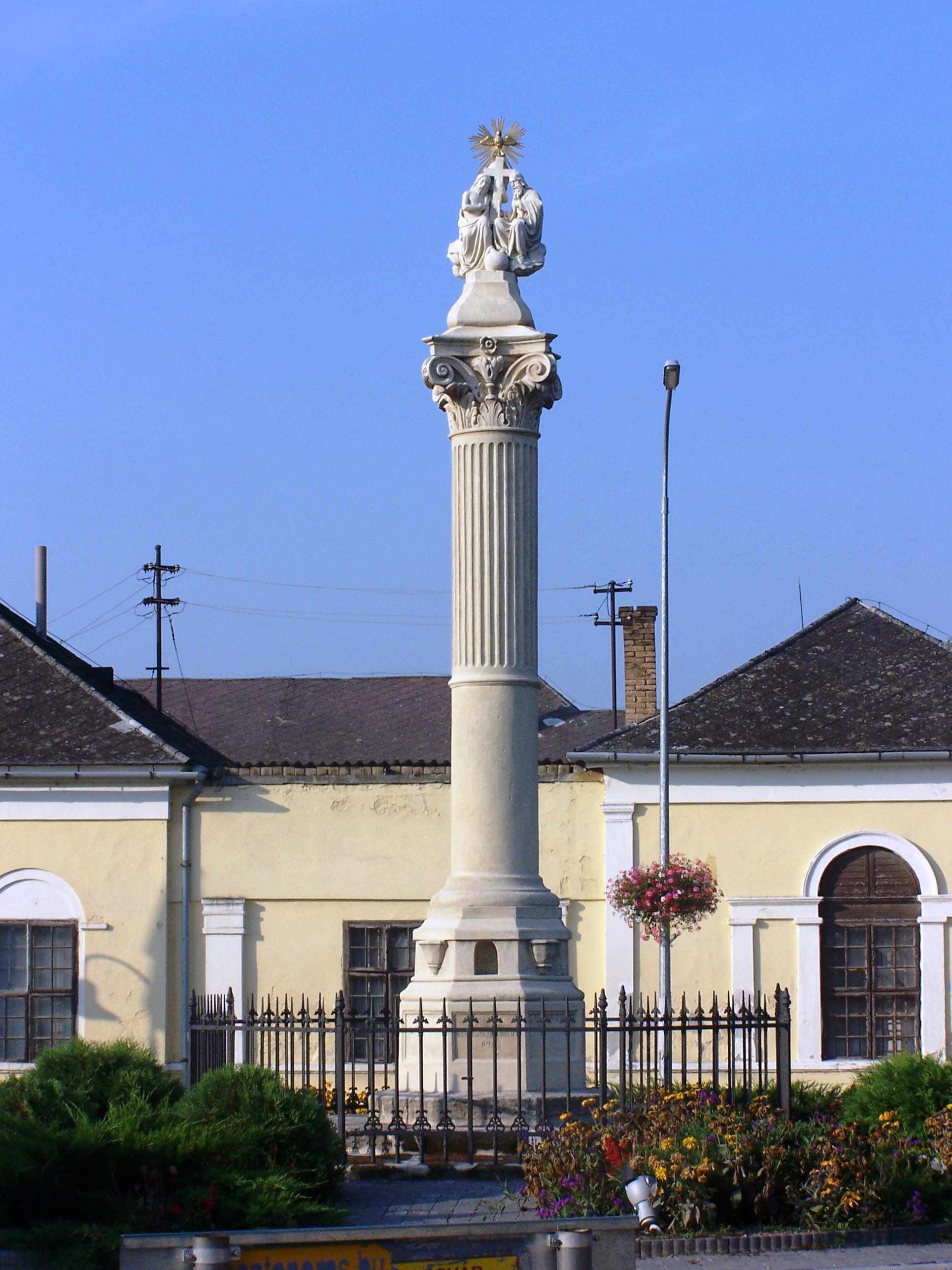 Szentháromság-oszlop (Biatorbágy, Bia, Vörös Hadsereg útja) This is a photo of a monument in Hungary, Identifier: 6910